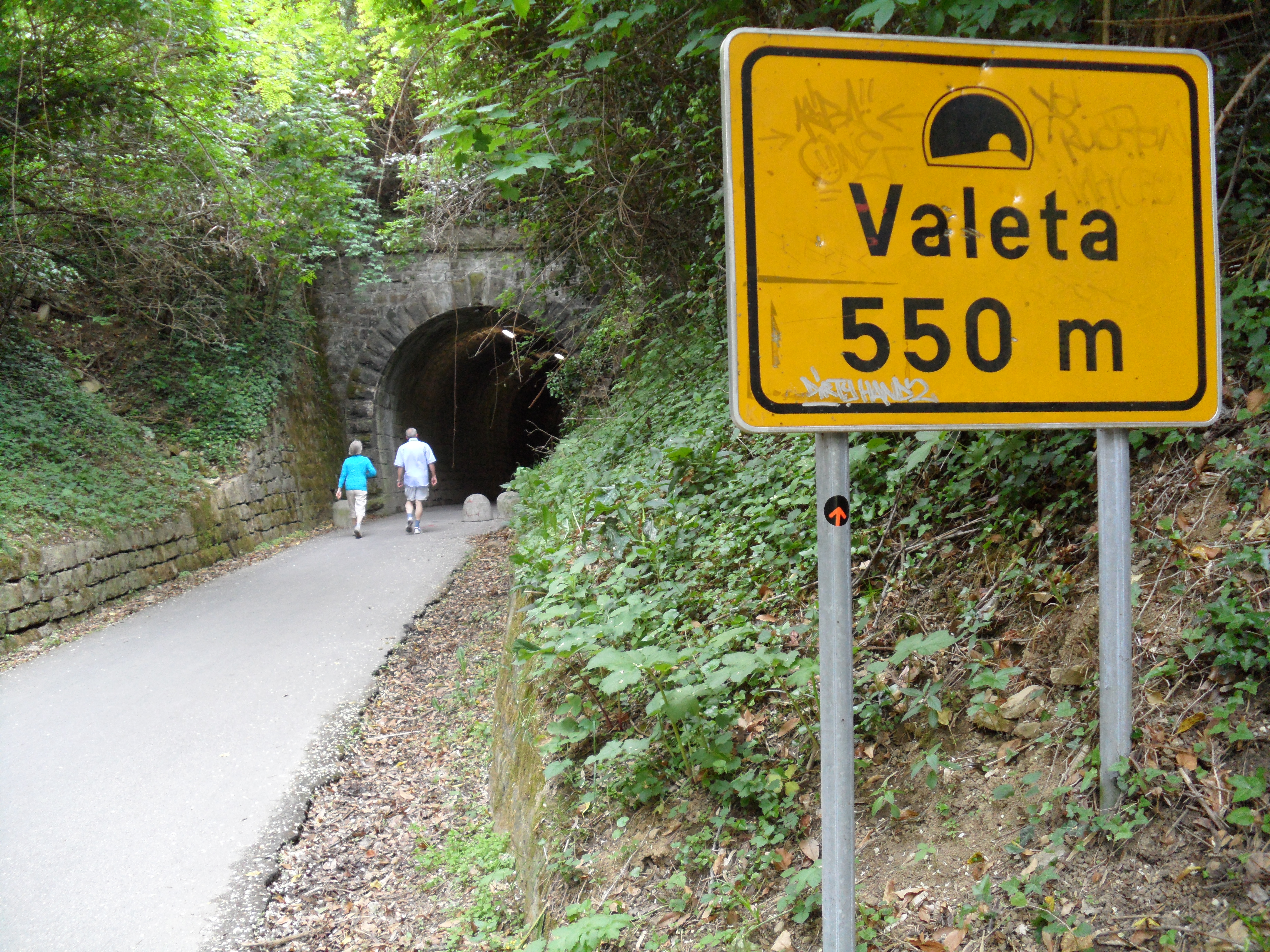 Predor nekdanje ozkotirne železnice med slovenskima obalnima mestoma Portorož in Strunjan